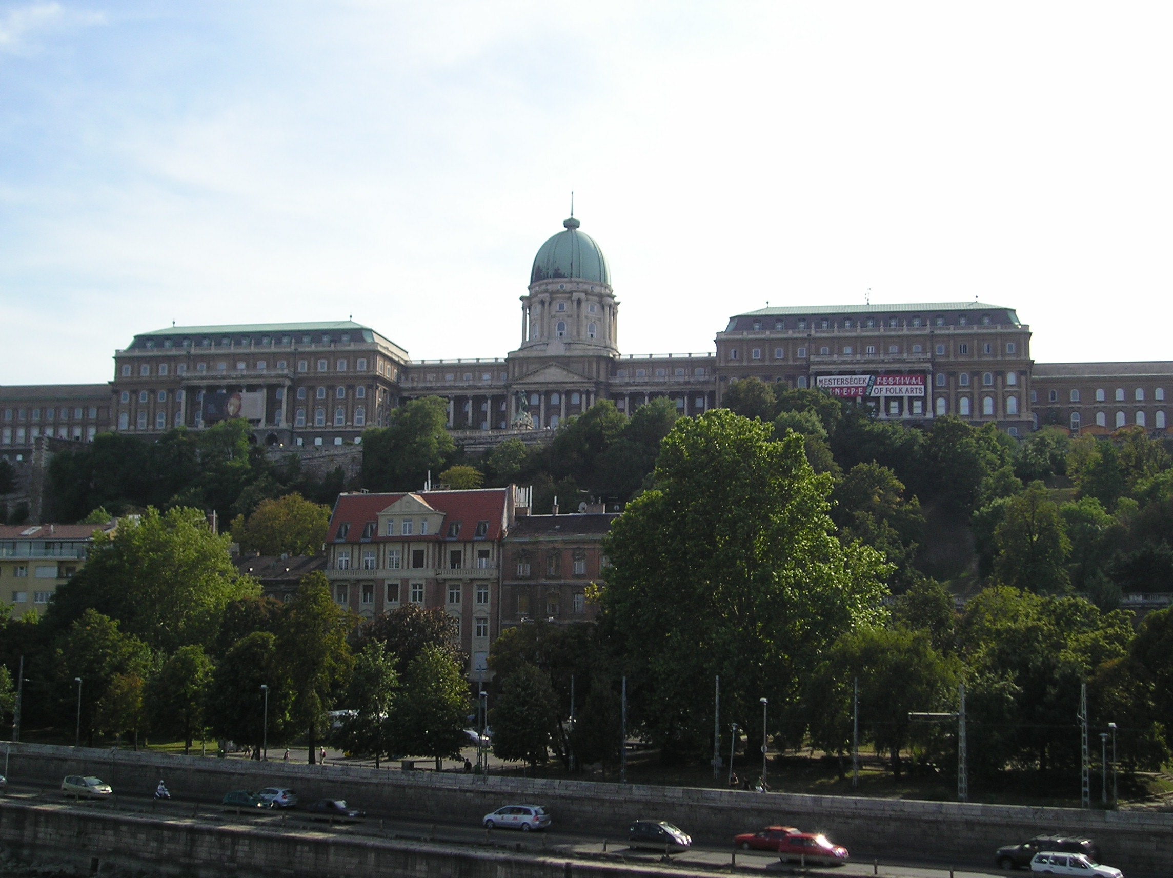 Questa foto rappresenta il Palazzo Reale a Budapest, è stata scattata da me, G. Salluzzi ad agosto 2007 ed è rilasciata in Pubblico Dominio